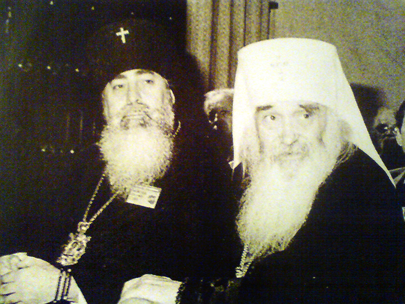 Metropolita warszawski i całej Polski Bazyli (Doroszkiewicz) oraz arcybiskup krasnodarski i kubański Włodzimierz (Kotlarow)